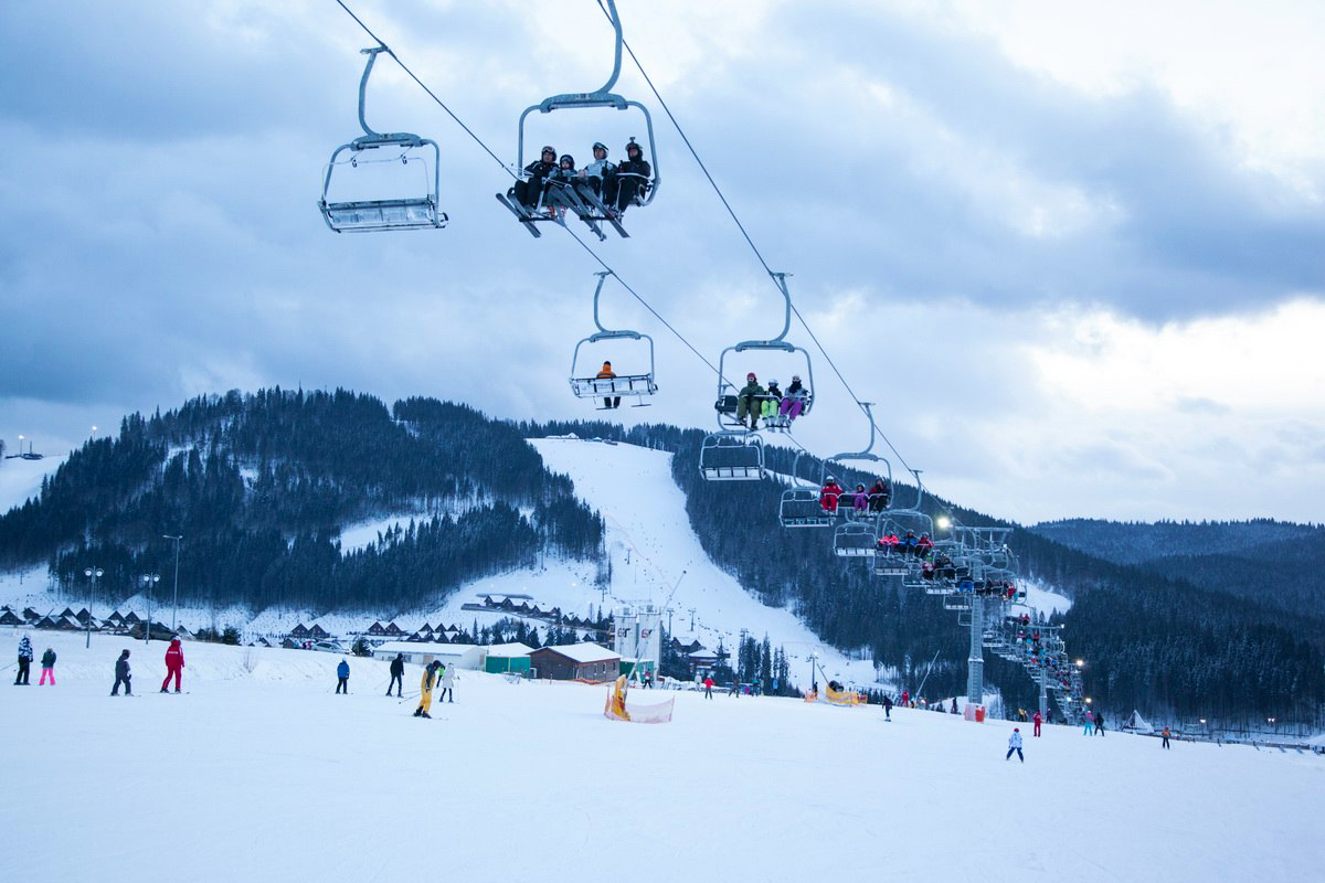 Вид на курорт Буковель, трассу и подъёмник